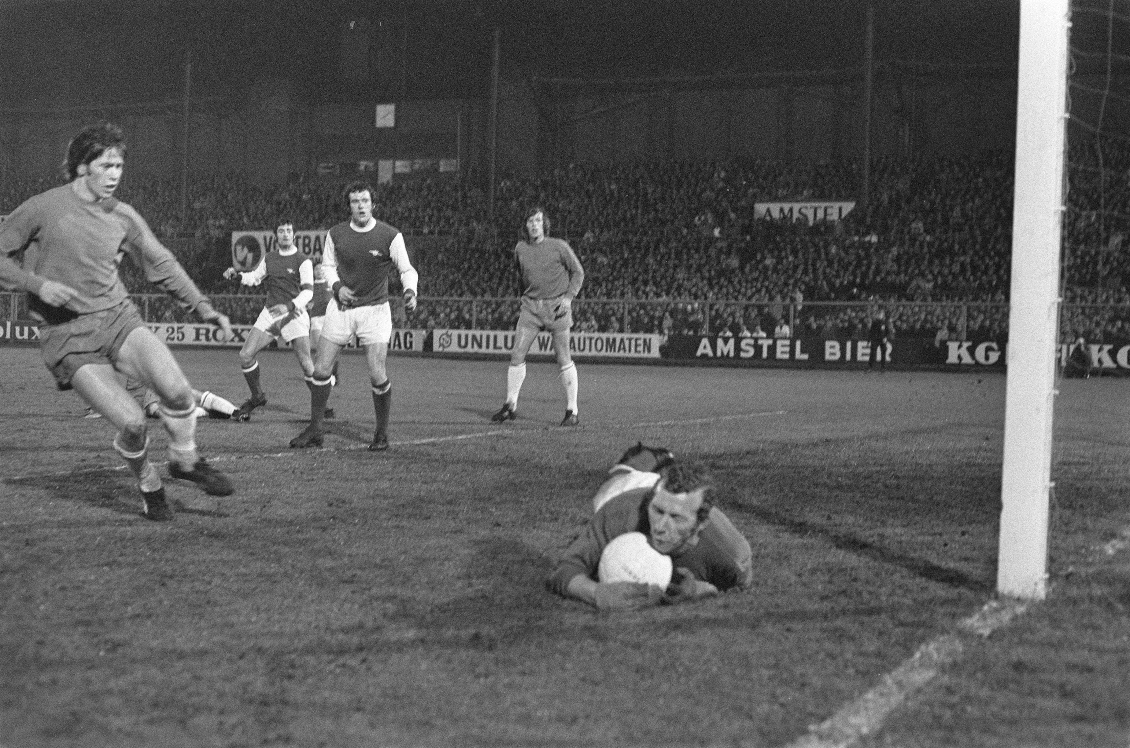 Collectie / Archief : Fotocollectie Anefo Reportage / Serie : Jaarbeursstedentournooi, halve finale: Ajax tegen Arsenal (1-0) Beschrijving : Ajax - Arsenal, 1-0. Halve finale Jaarbeursstedenbeker. Peter Storey, Johan Cruijff (??), Frank McLintock en Dick van Dijk (v.l.n.r.) in actie Annotatie : randnummer negatiefstrook nr. 7: Gerrie Mühren en keeper Bob Wilson Datum : 15 april 1970 Locatie : Amsterdam, Noord-Holland Trefwoorden : voetbalsport Persoonsnaam : Cruijff, Johan (??), Dijk, Dick van, McLintock, Frank, Storey, Peter Fotograaf : Fotograaf Onbekend / Anefo Auteursrechthebbende : Nationaal Archief Materiaalsoort : Negatief (zwart/wit) Nummer archiefinventaris : bekijk toegang 2.24.01.05 Bestanddeelnummer : 923-4432